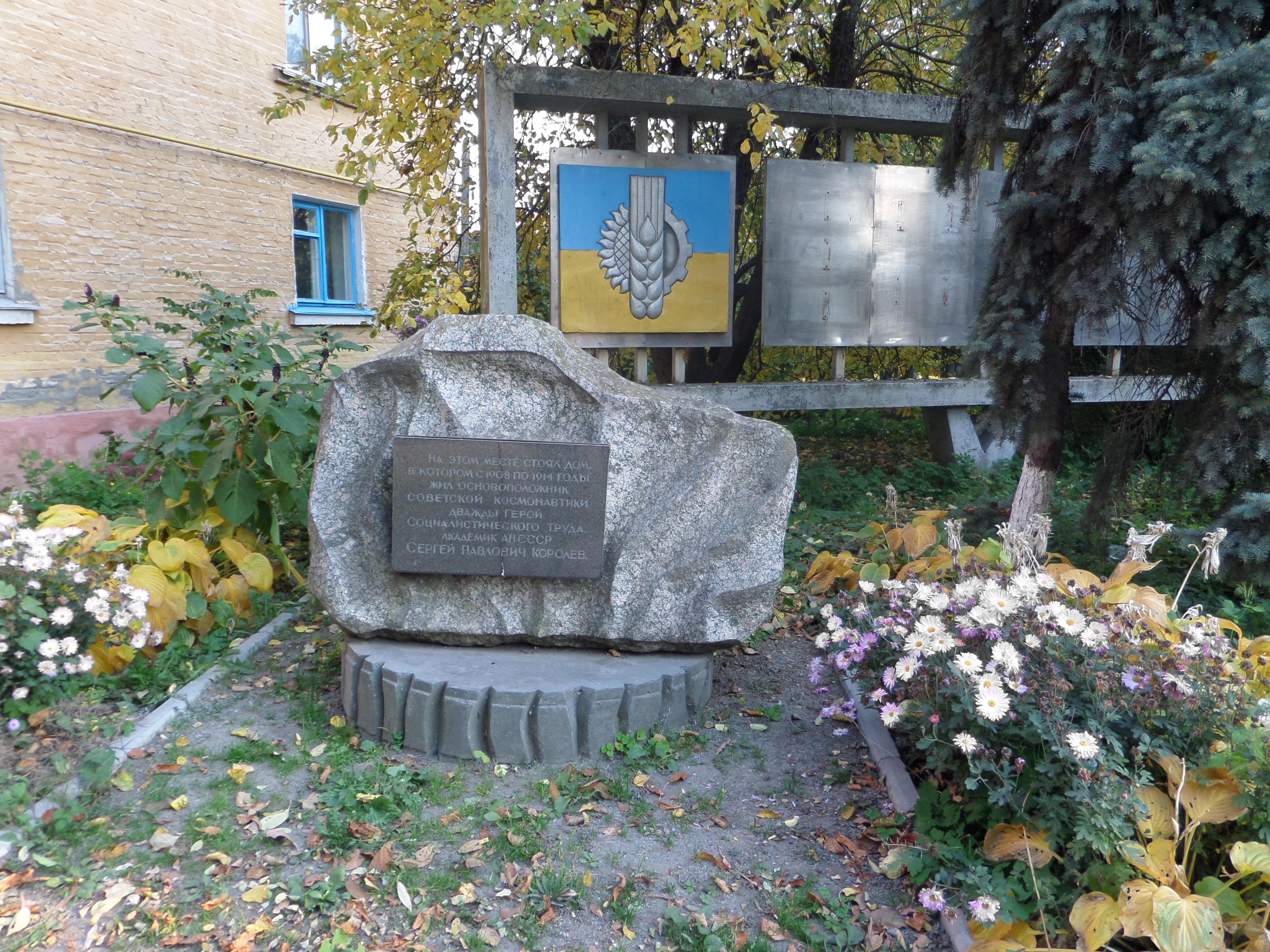 Пам’ятний знак на місці будинку, в якому провів дитячі роки С.П.Корольов, 1908-1914рр., Ніжин, вул. Батюка, біля адмінбудинку